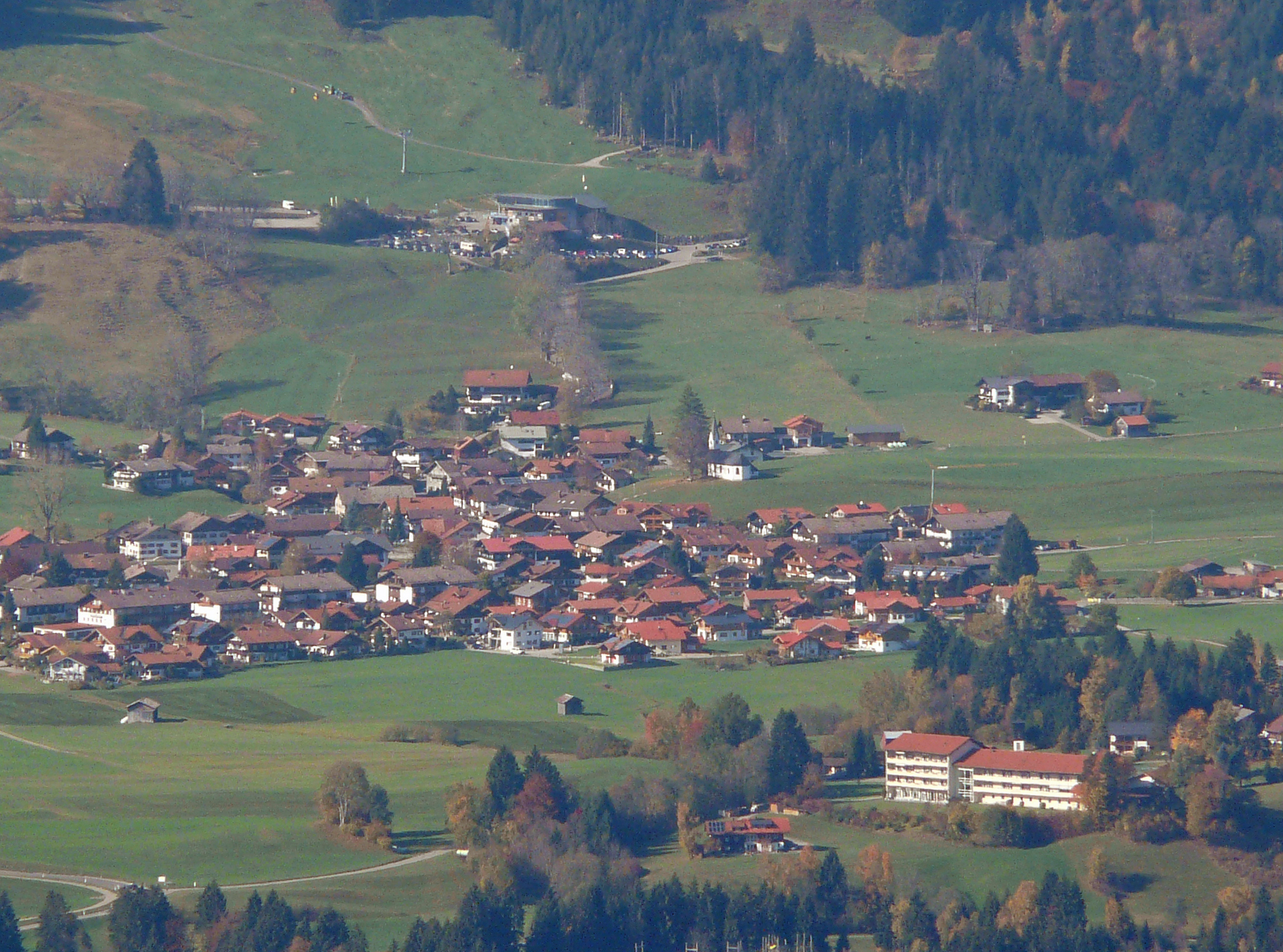 Bolsterlang von Osten